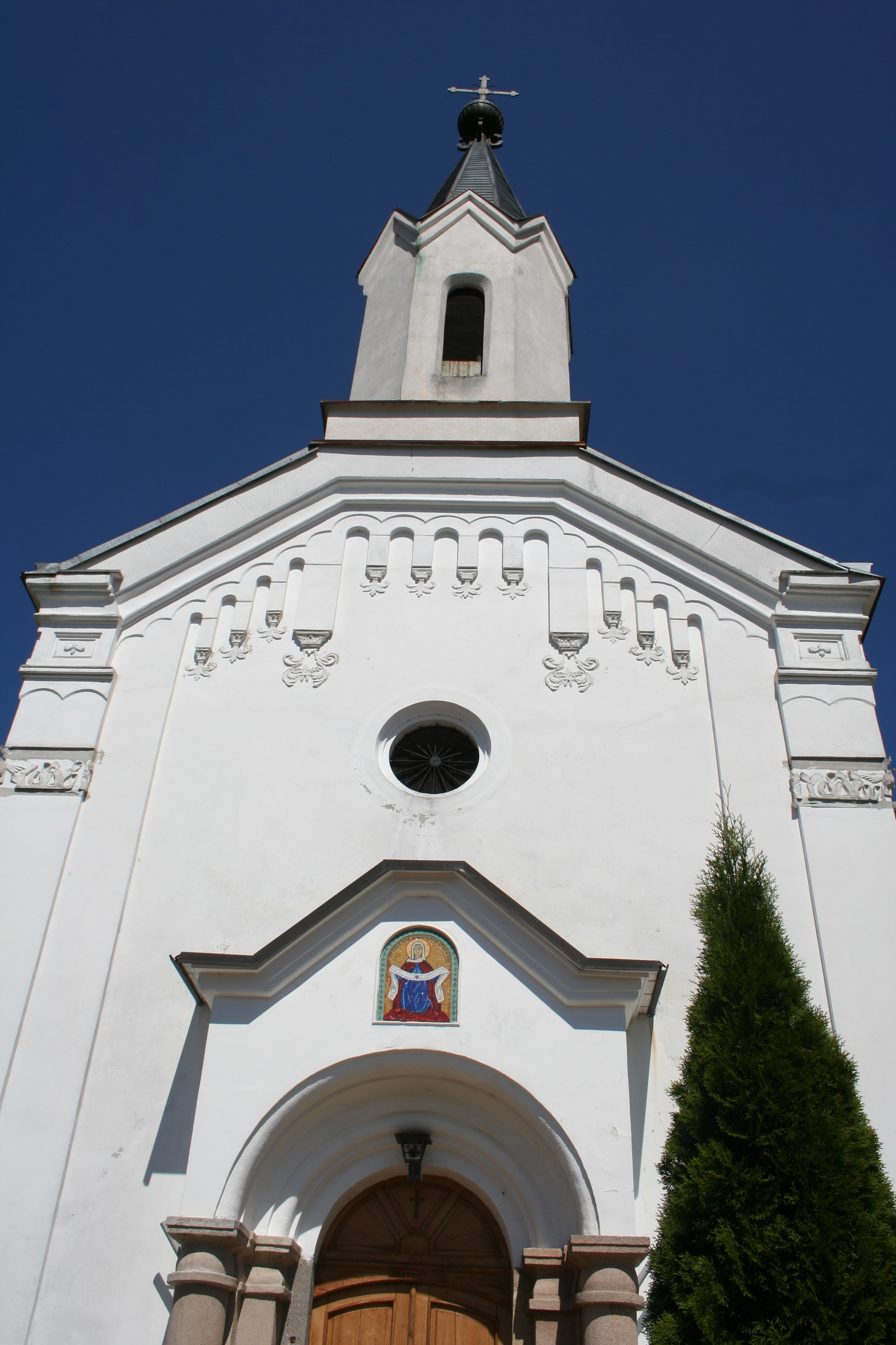 Crkva Pokrova Presvete Borodice, Belanovica